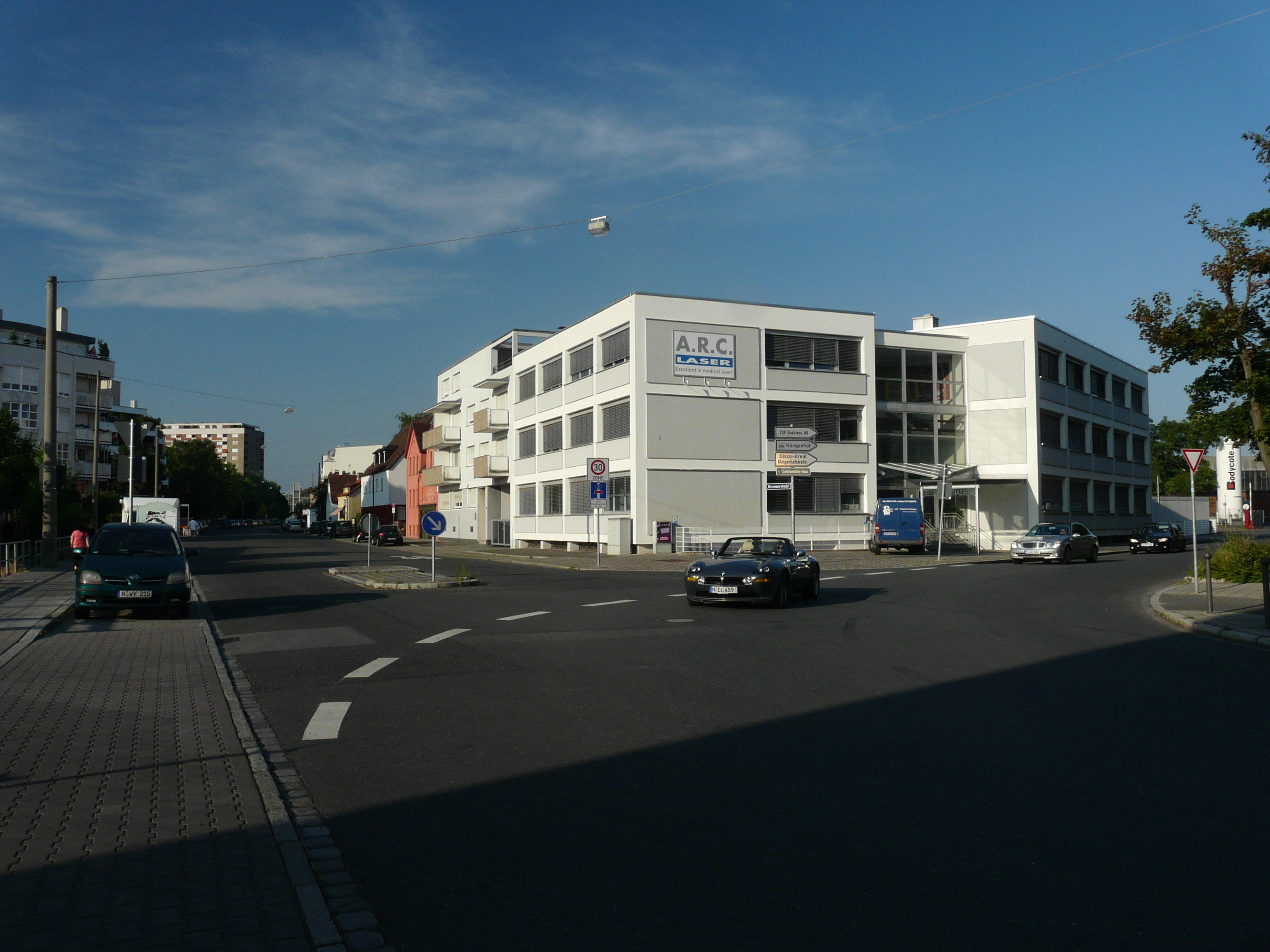 Der Stadtteil Klingenhof, ein Ortsteil der Stadt Nürnberg